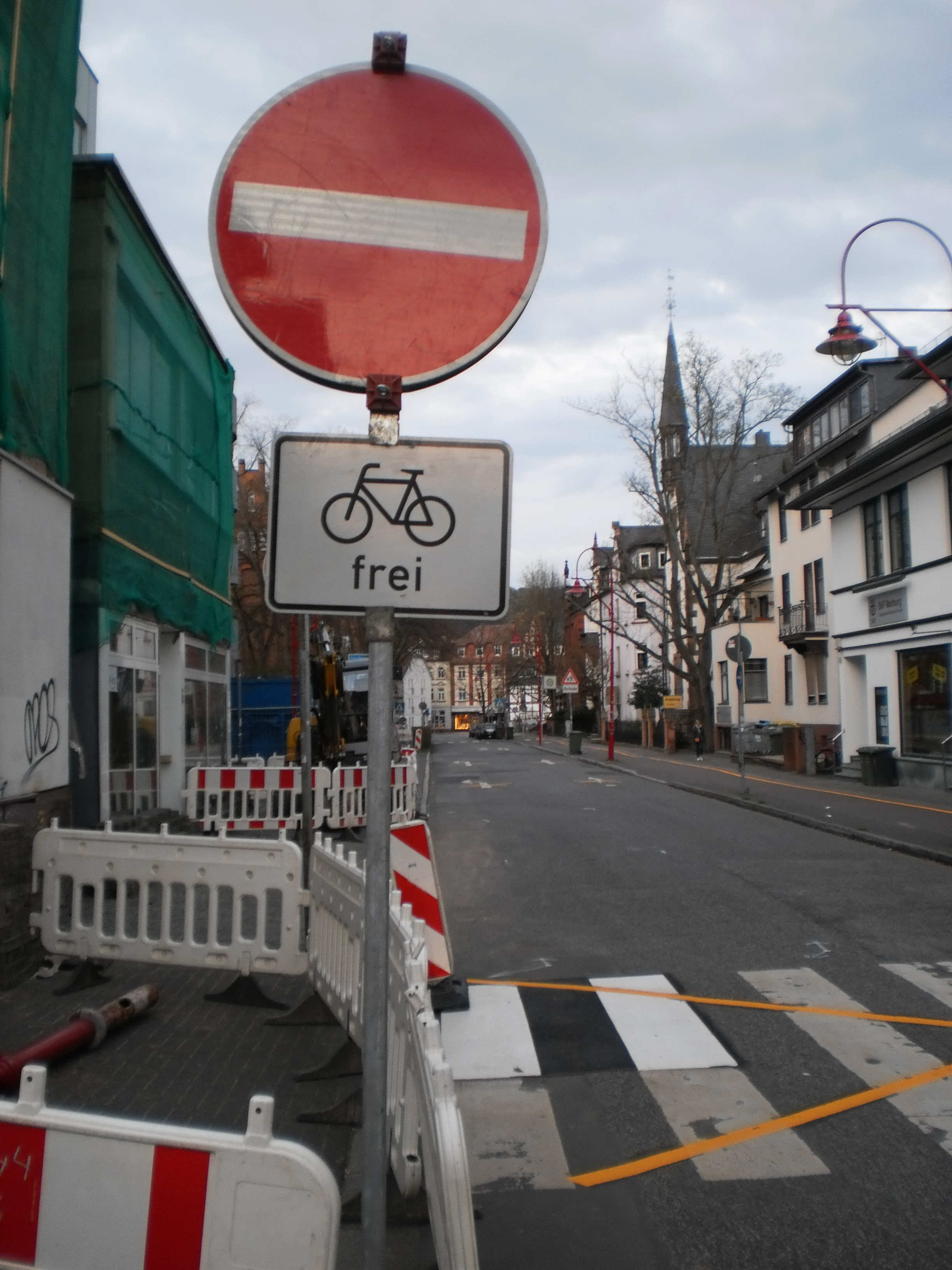 Baustelle in der Schulstraße mit Freigabe einer Einbahnstraße für den Radverkehr in Marburg mit Zusatzzeichen 1022-10, Seit Anfang April 2017 wurde die Einbahn-Richtung umgekehrt, das Parkhaus sowie der Gebäudekomplex an Gutenbergstraße und Universitätsstraße werden umgebaut, die Öffnung für das Fahren in beide Richtungen bleibt für Fahrradfahrer auch während der Bauphase erhalten (2. April 2017).